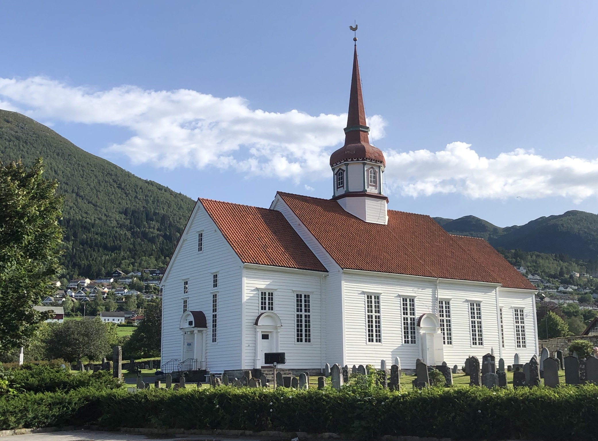 Kirche in Nordfjordeid